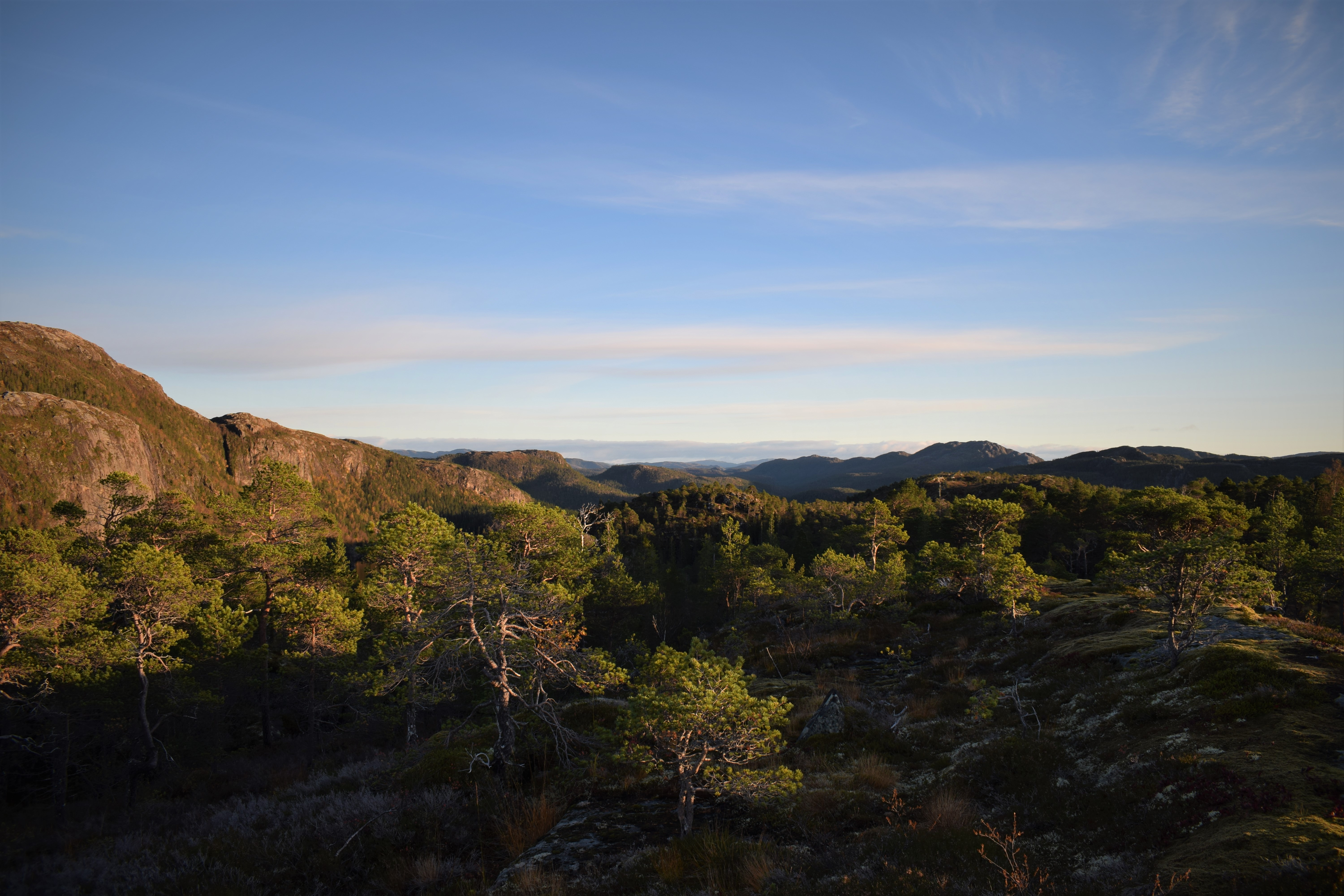 Fra fjellovergangen ved Hestmarkfjellet på fylkesvei 769 mellom Salsnes og Breksillan.